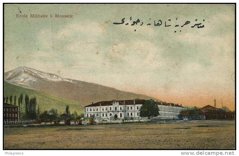 Битолското военно училище.